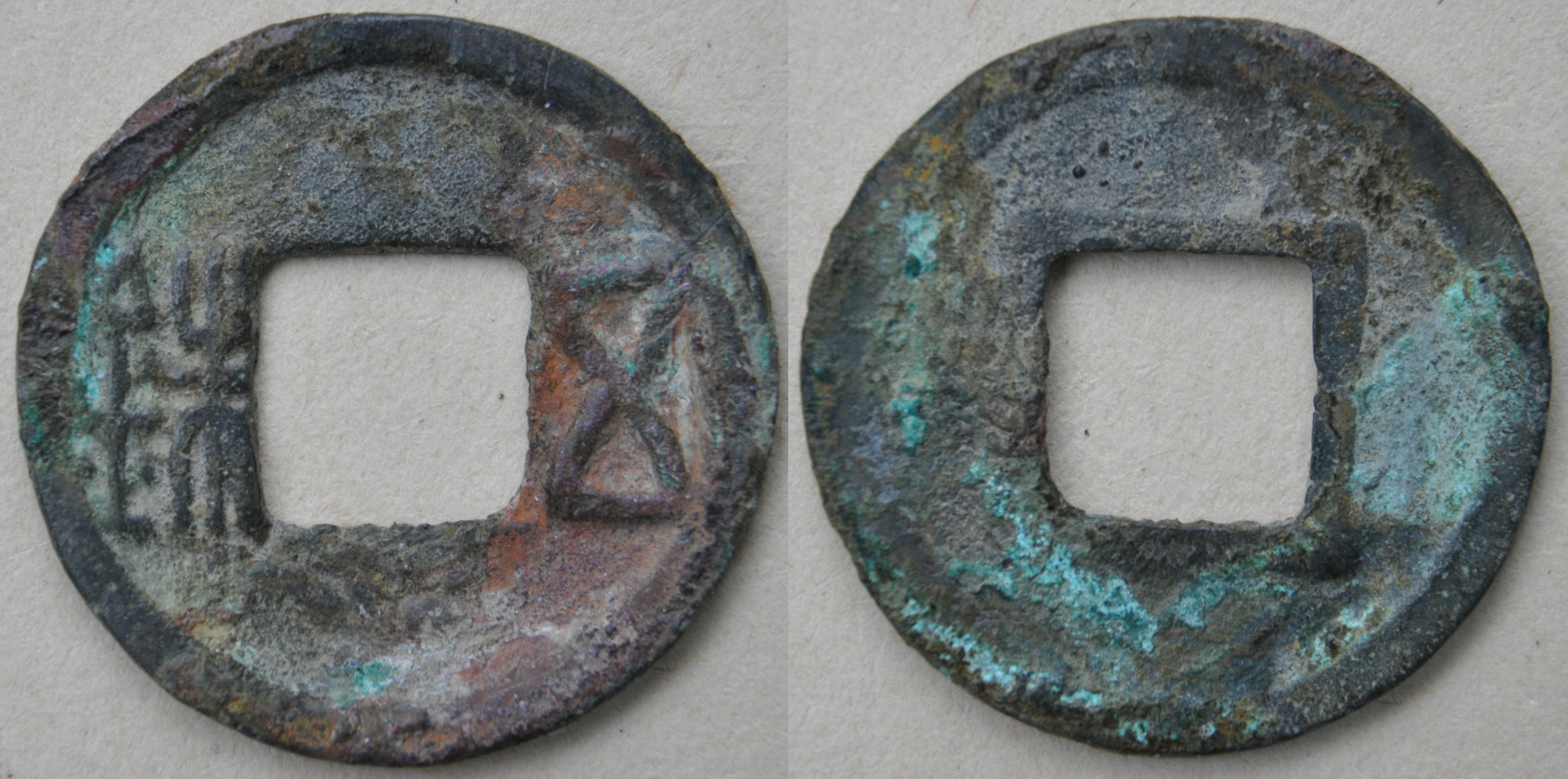 S529 : A/ Wuzhu R/ vide Dimension : 24.38 mm Poids 2.7 g. Bronze Monnaie de la dynastie Chen (557-589), empereur Wendi (560-589) ère Tian Jia (560-566), émise à partir du 13 avril 562.